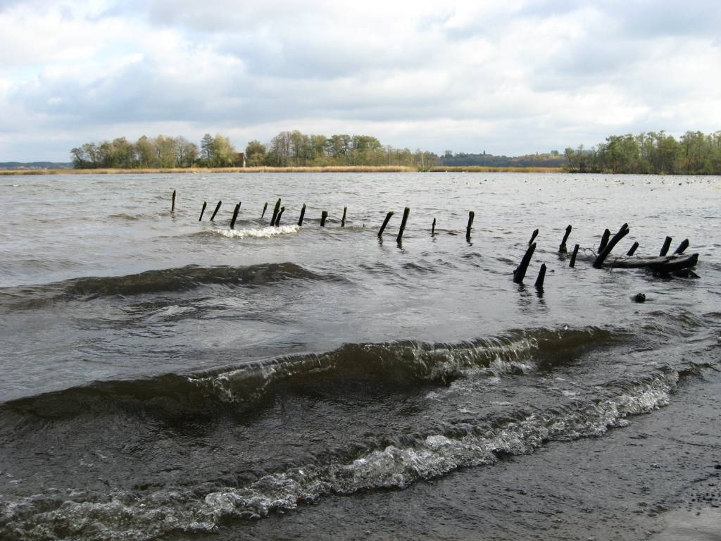 Der Tollensesee, Blick auf die Fischerinsel (Mecklenburg-Vorpommern